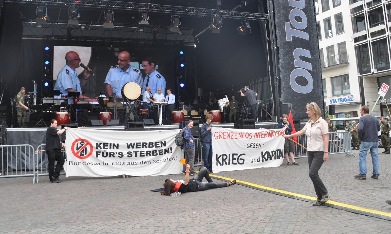 Teilnehmer am Tag der Bundeswehr kritisieren, dass die Bundeswehr die Bevölkerung von Militäreinsetzen zu überzeugen versucht, um junge Menschen für den Kriegsdienst zu werben.